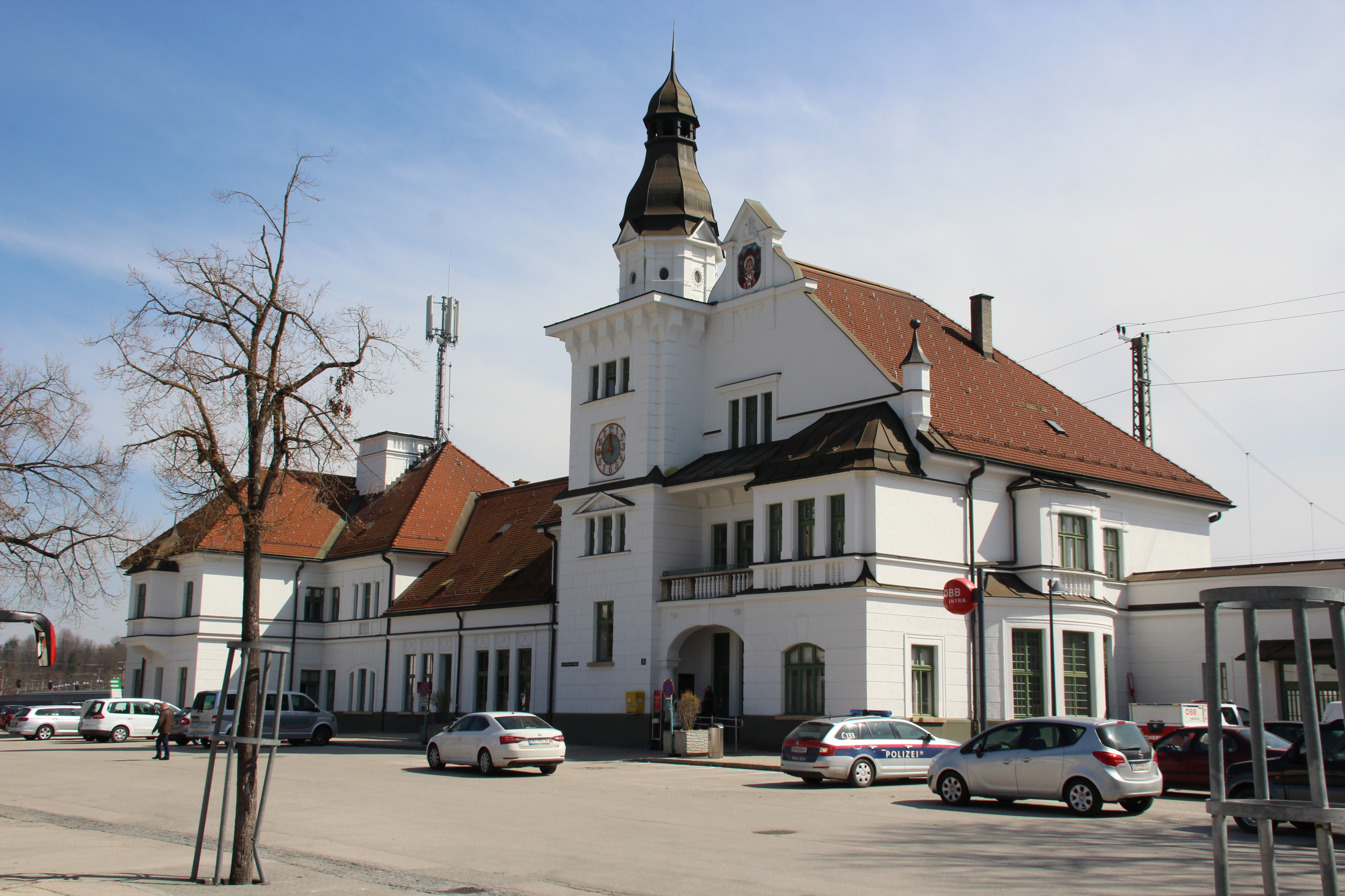 Bahnhofsgebäude von St. Veit an der Glan